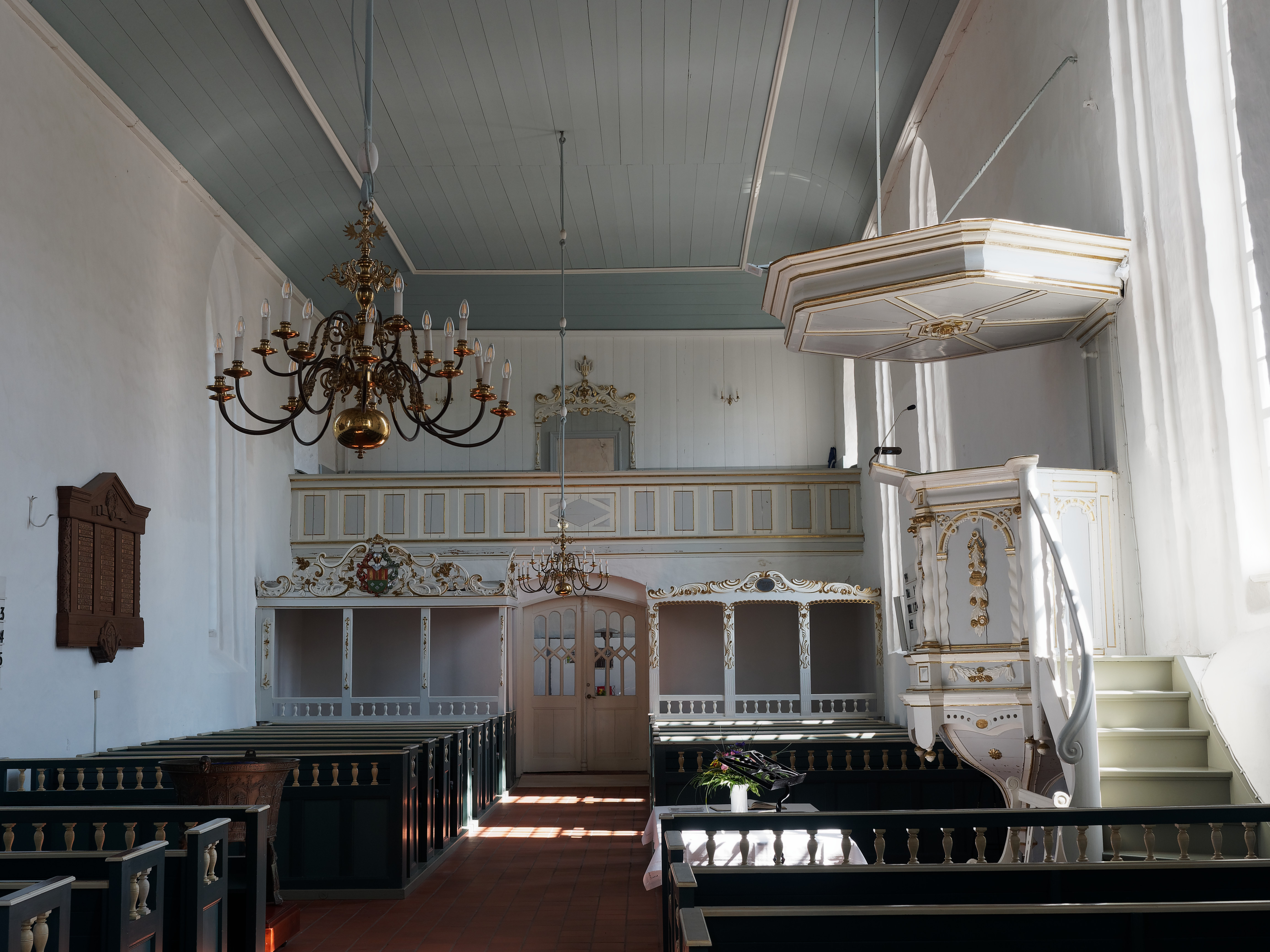 Herrengestühl der Oster- und Westerburg beiderseits der Tür zum Chorraum und die Kanzel der ev. reformierten Kirche in Groothusen (Ostfriesland).